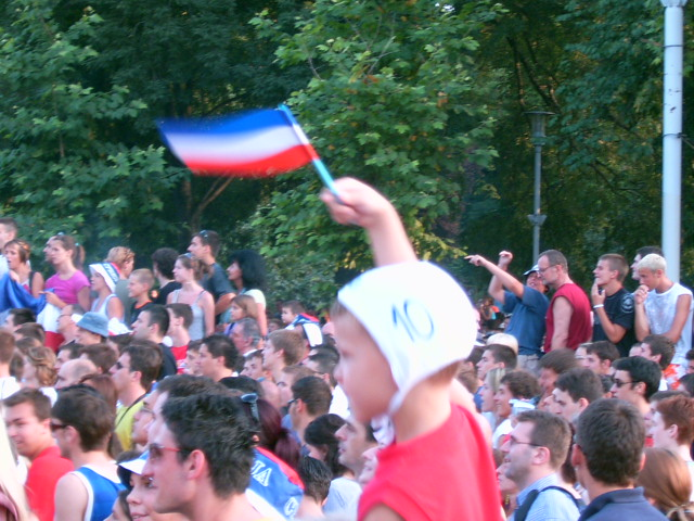 Дочек ватерполиста испред скупштине 2005. године - светски прваци.